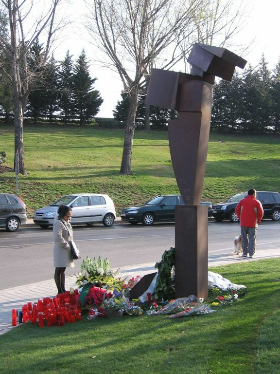 Carlos Albert. Ilusión Truncada, 2007. Monumento en memoria a las víctimas del 11-M. Excmo. Ayuntamiento de Madrid. Estación de tren de Santa Eugenia.